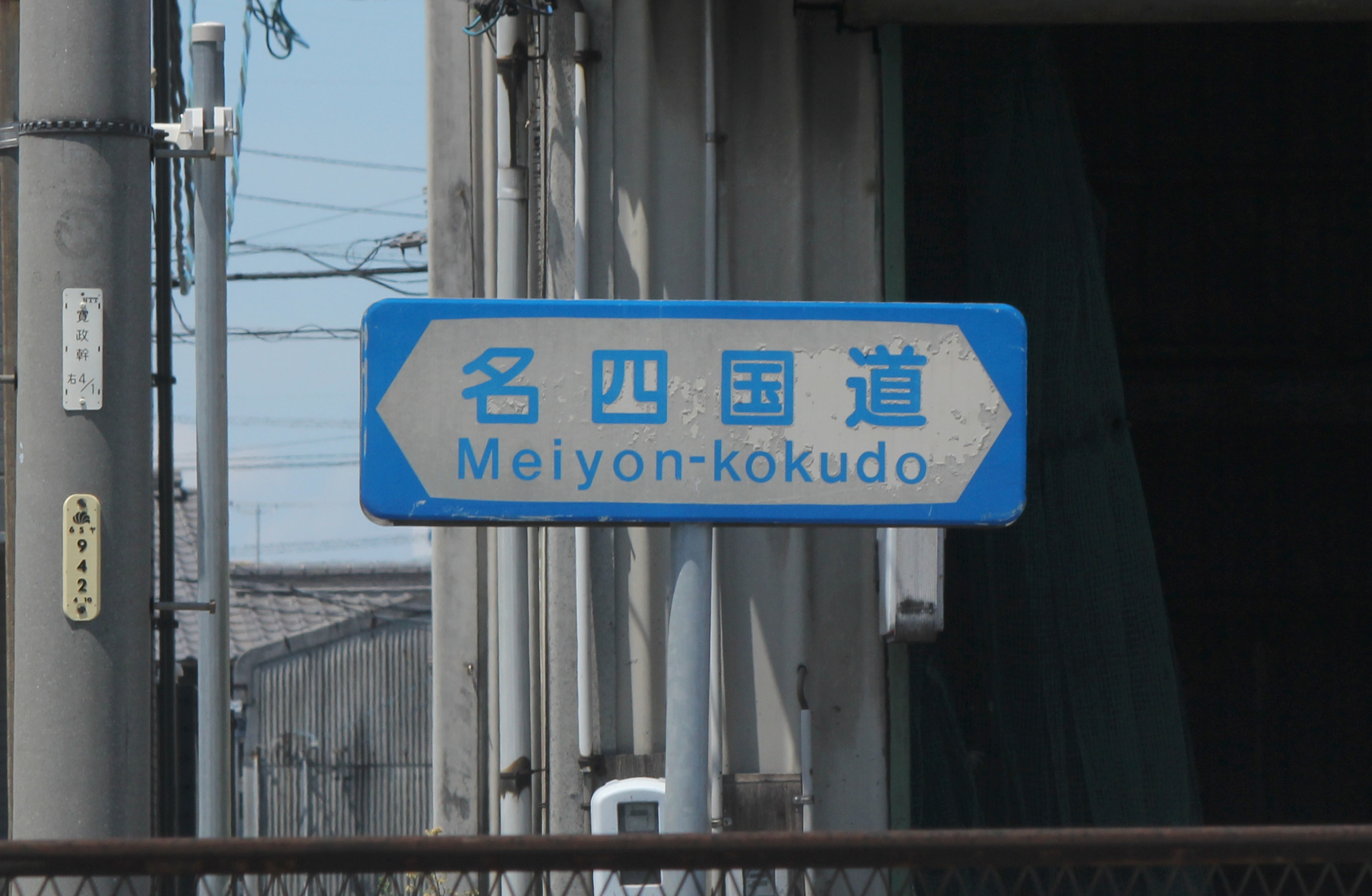 名四国道の案内標識